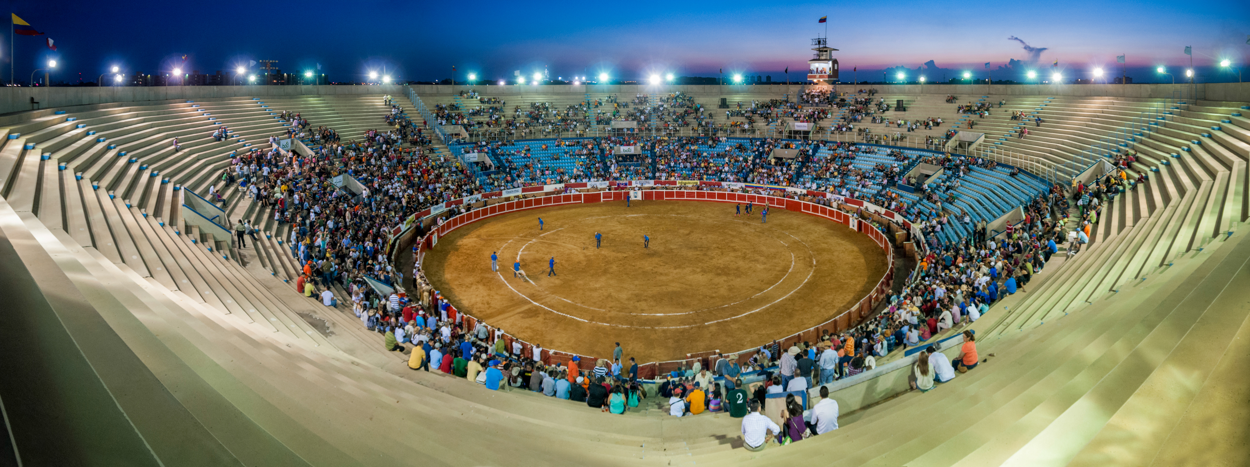 Plaza de Toros de Maracaibo, Venezuela